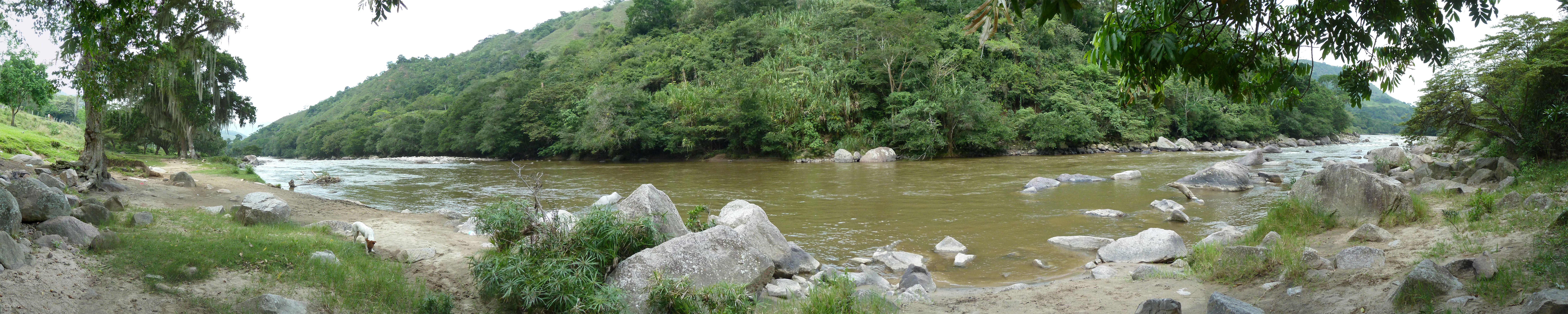 Río Suaza "Los Carbones" del municipio de Guadalupe Huila